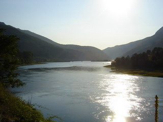 Akumulacija Gorica kod Trebinja. Sliku sam ja napravio.